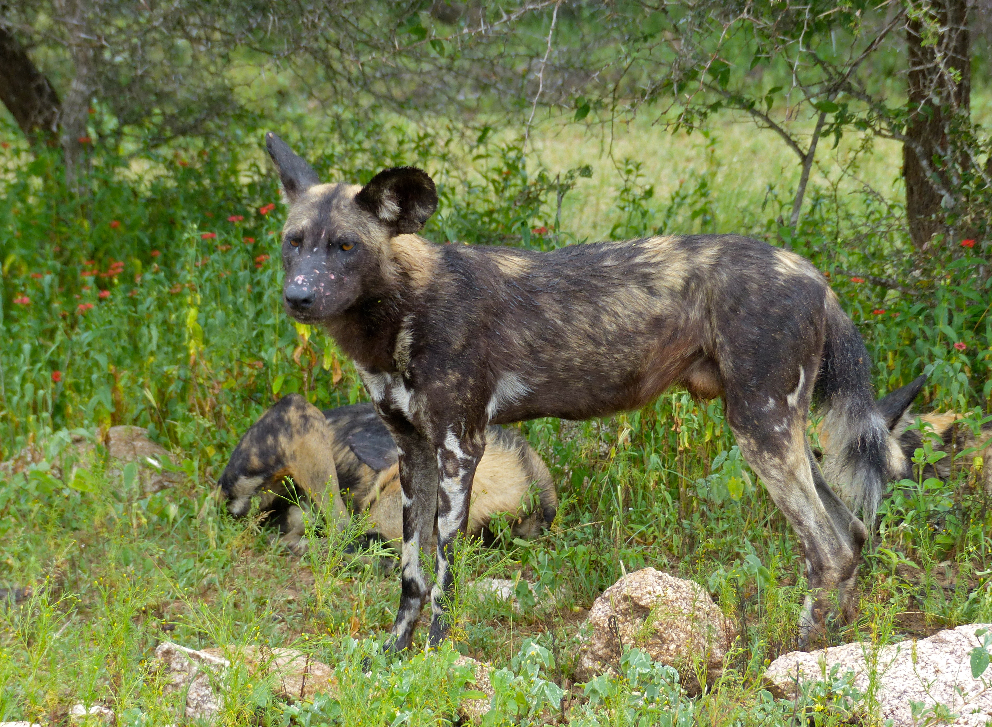 H4-1 Road East of Skukuza, Kruger NP, SOUTH AFRICA